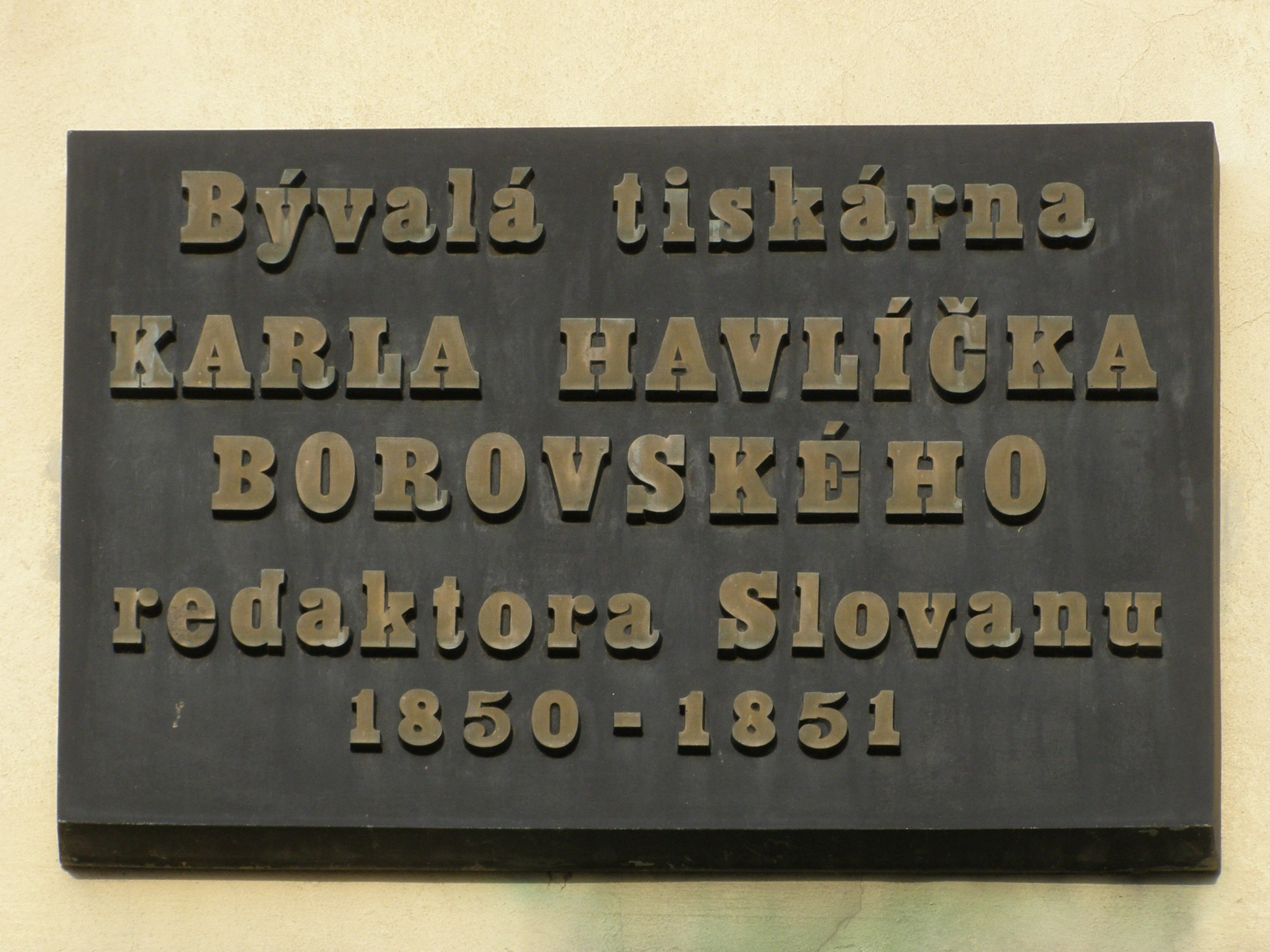 Kutná Hora, část Kutná Hora-Vnitřní Město, ulice Na Náměti, pamětní deska připomínající bývalou tiskárnu Karla Havlíčka Borovského, dnes v této budově sílí Policie ČR